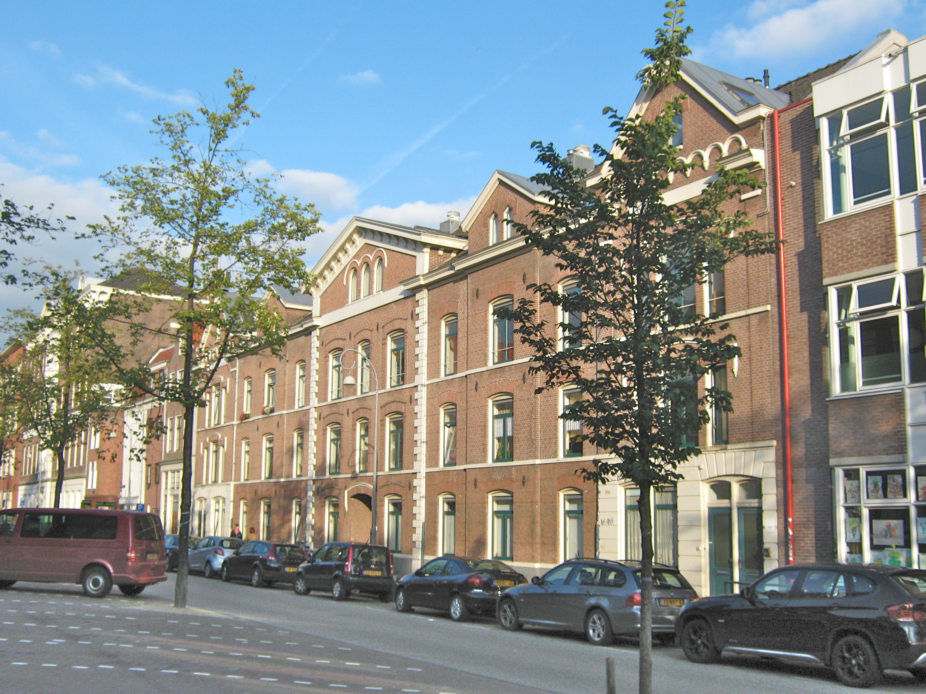 Westerstraat 215-295, sociale woningbouw in de Jordaan van architect P.J. Hamer, Jordaan-noord, Amsterdam in opdracht van N.V. Bouwmaatschappij Concordia